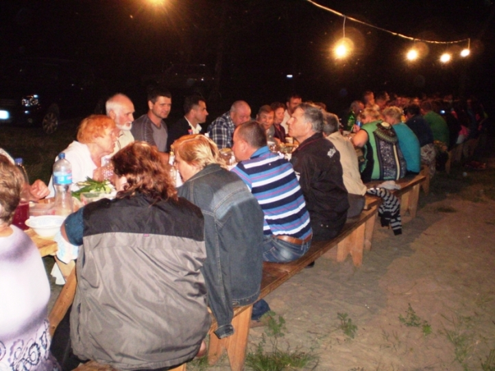 Свято Івана Купала ( гуляємо ми добре ).